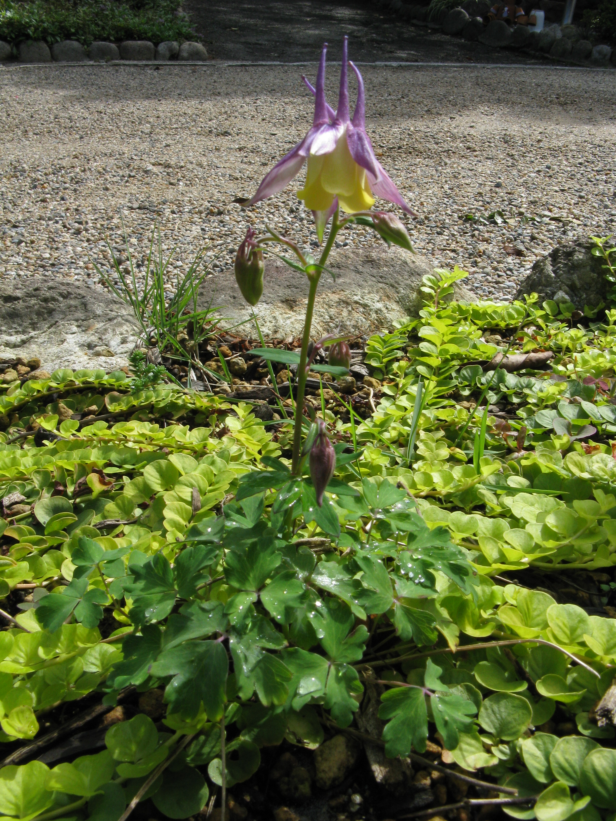 Scientific name Aquilegia x maruyamana